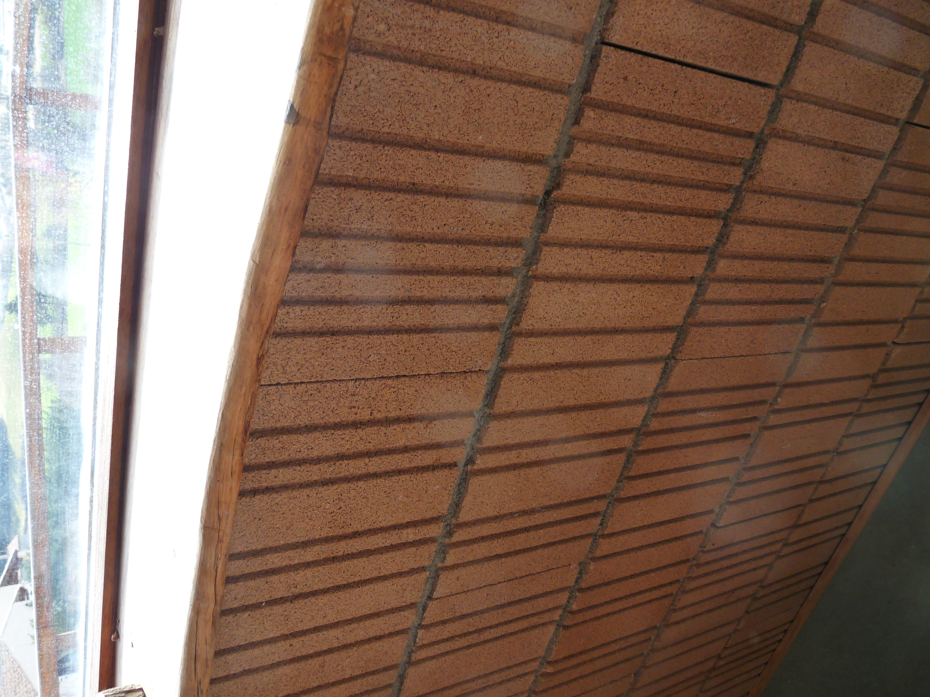 mur trombe, mur accumulant les calories du soleil en vue de chauffer l'intérieur de la maison. Derrière une vitre, face sud de la maison, ce mur chauffe un maximum en hiver, et restitue sa chaleur dans le salon. Cela permet de faire des économies de chauffage.